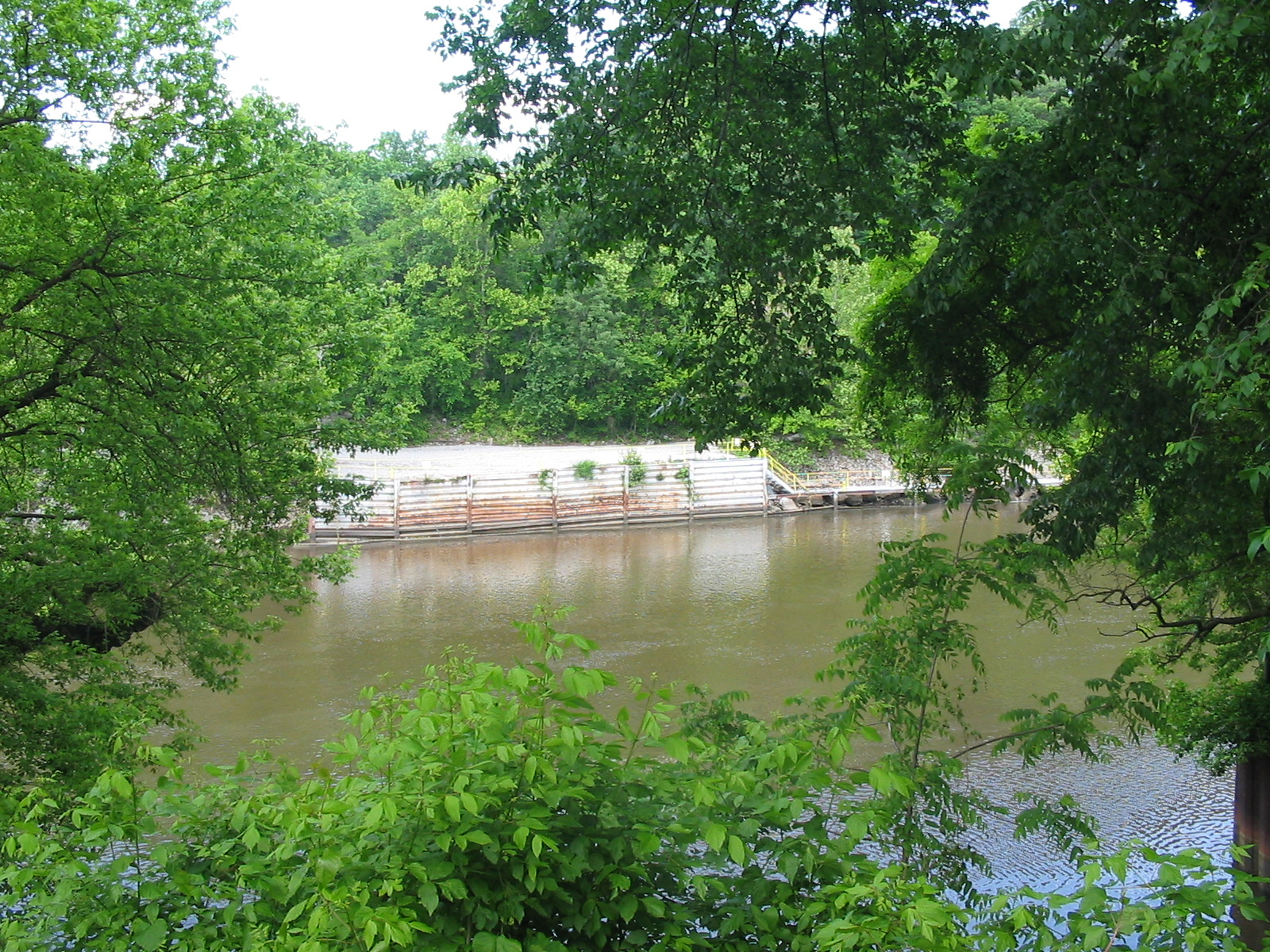 Occoquan, VA